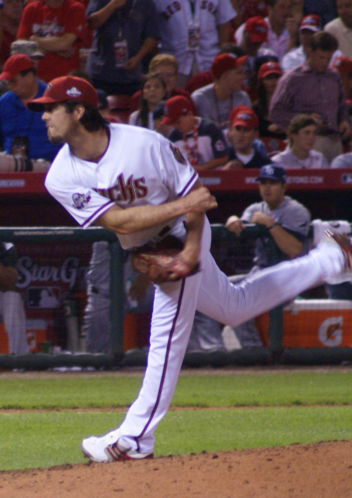 Dan Haren